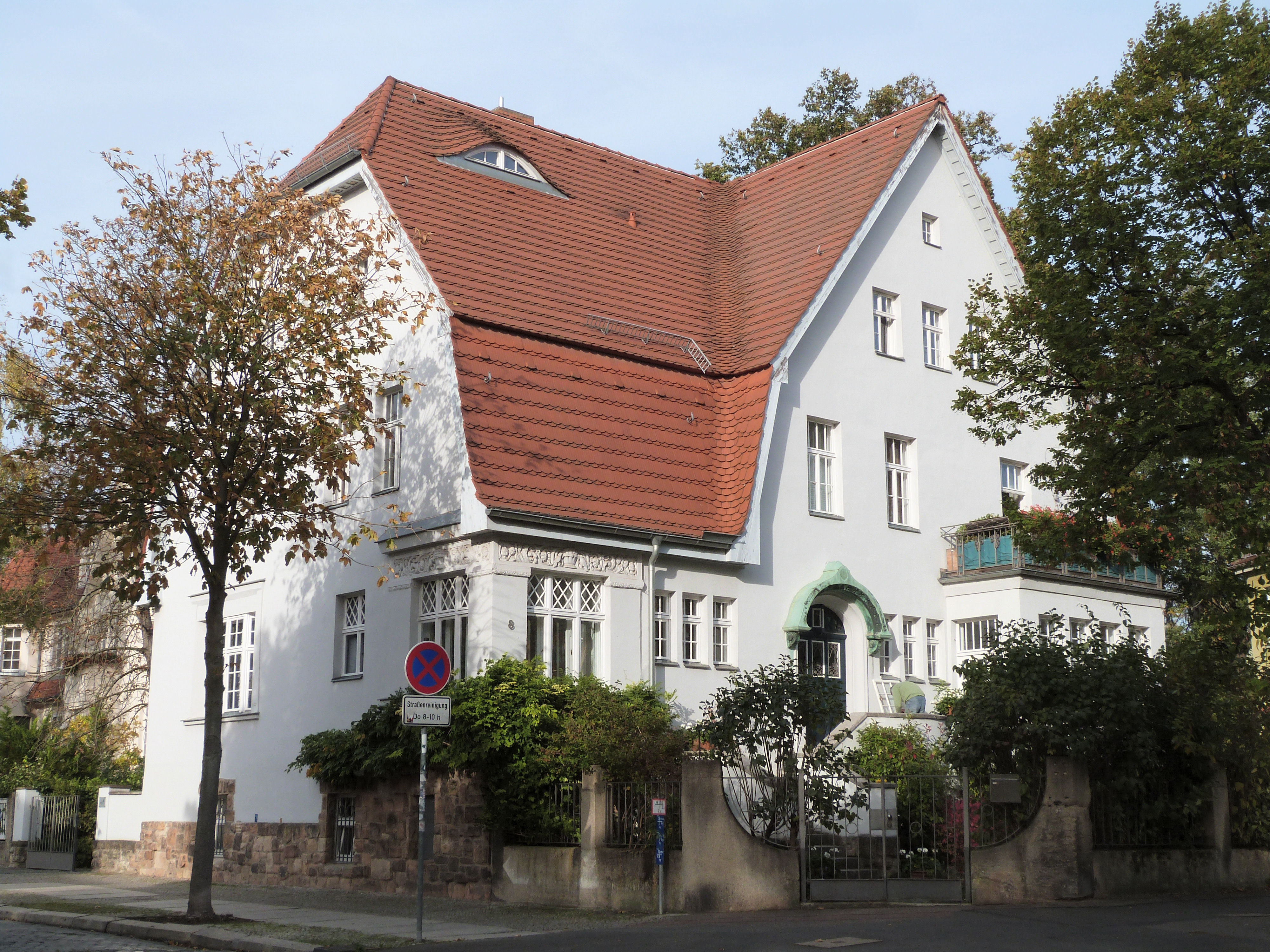 Villa Rathenauplatz 8, Halle (Saale)